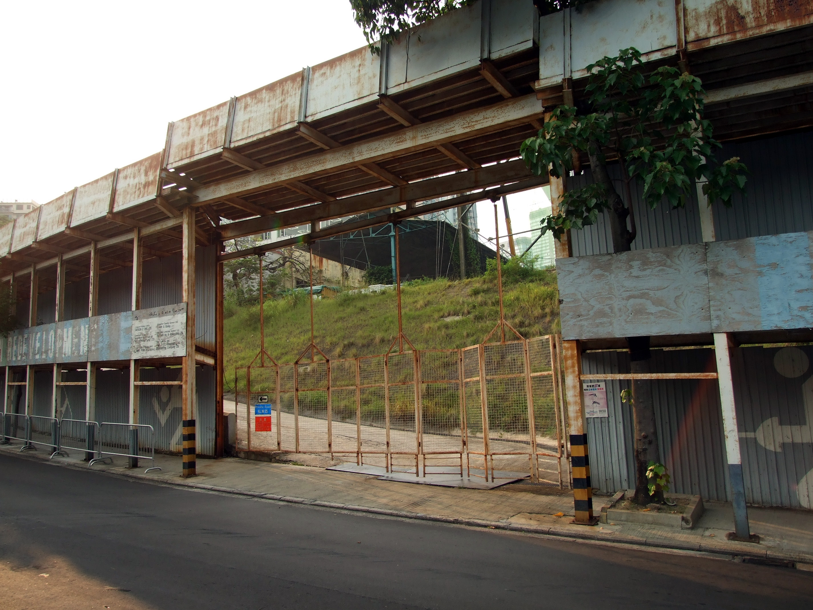 中文（香港）: 南華球場旁的斜路